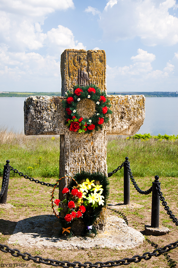 Каменская Сечь